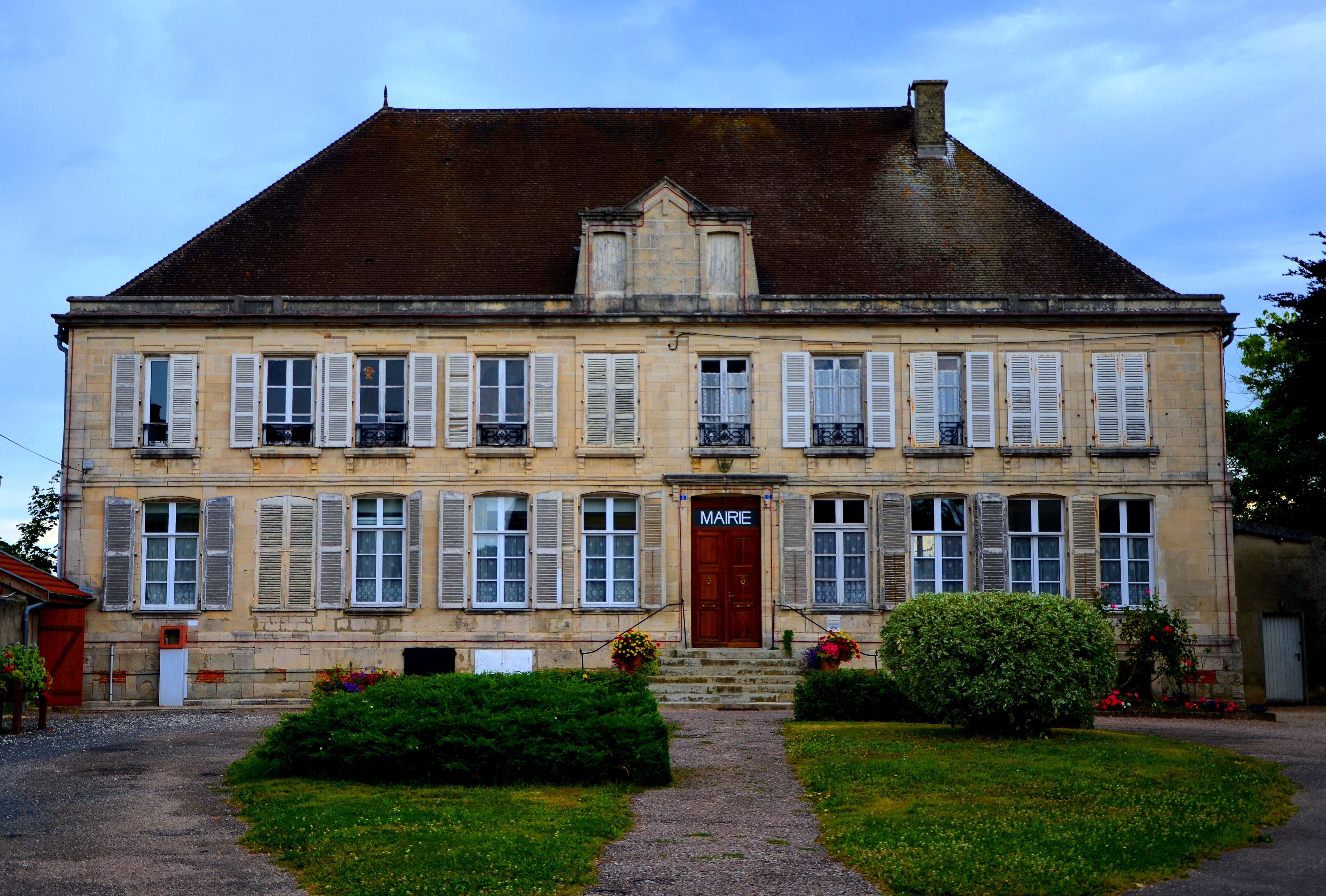 Mairie d'Eclaron, Haute-Marne, France